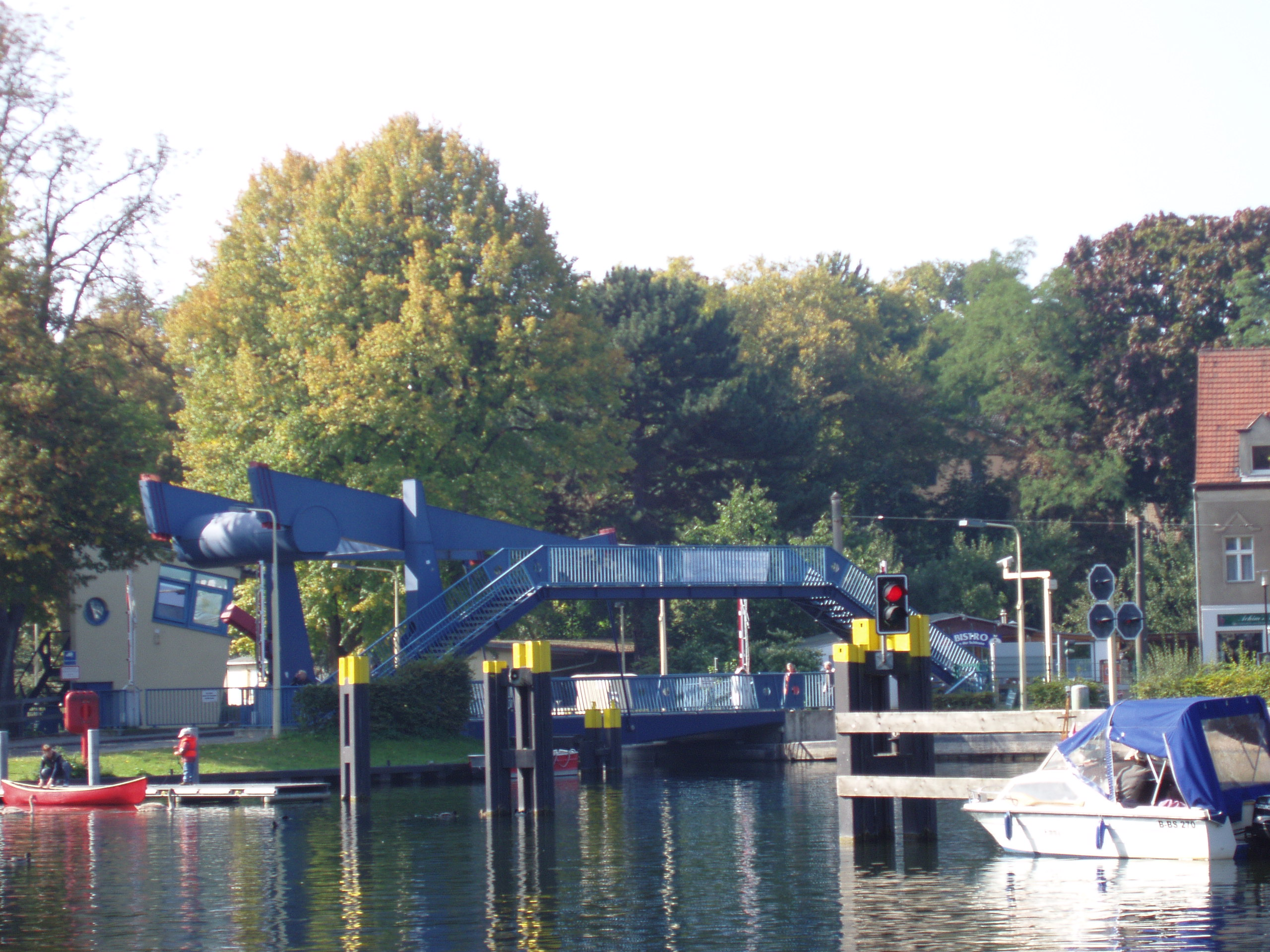 Kalksee auf Höhe der Woltersdorfer Schleuse